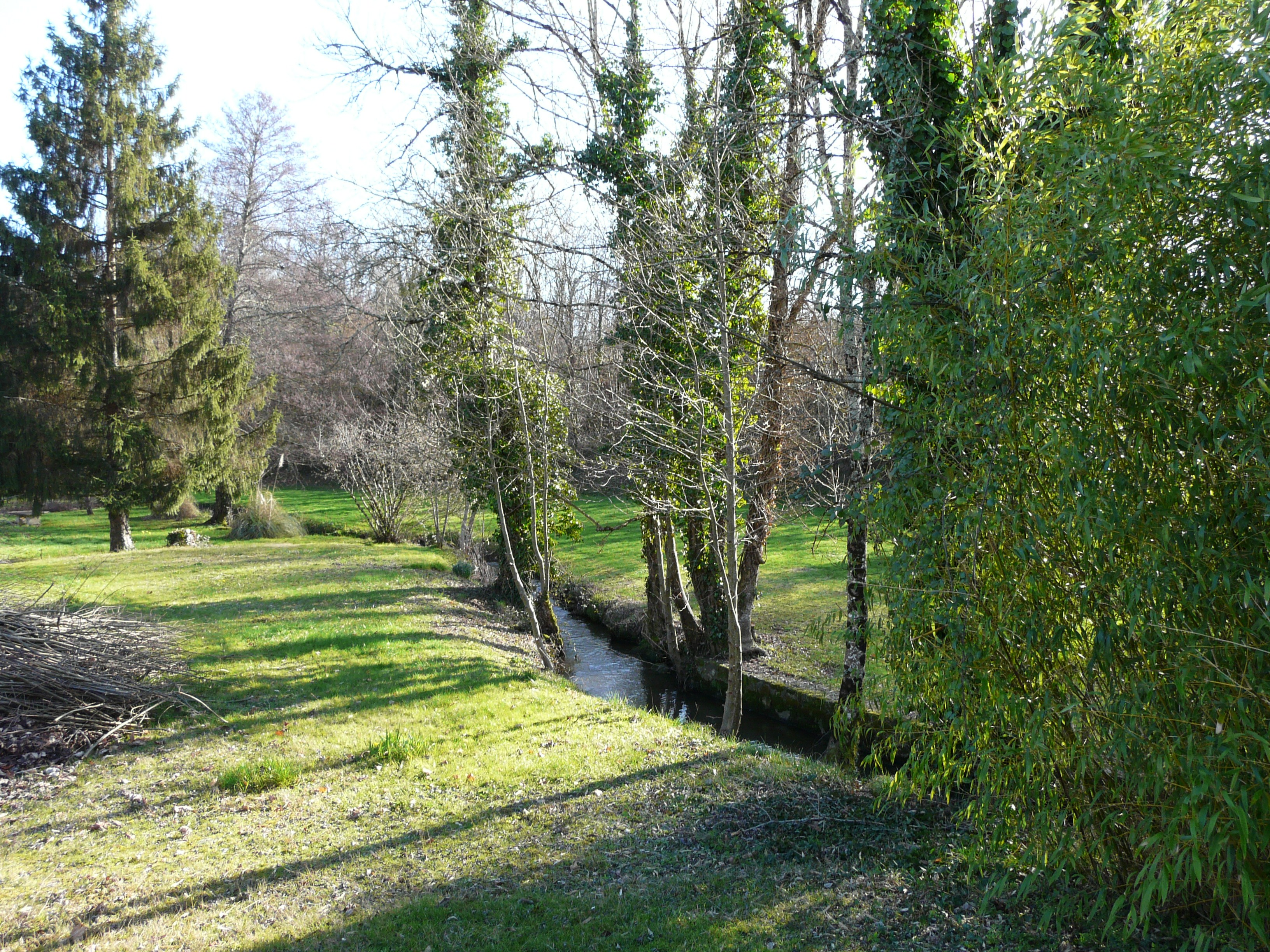 Ruisseau la Belle en contrebas du bourg de Monsec, Dordogne, France. Vue prise en direction de l'amont.